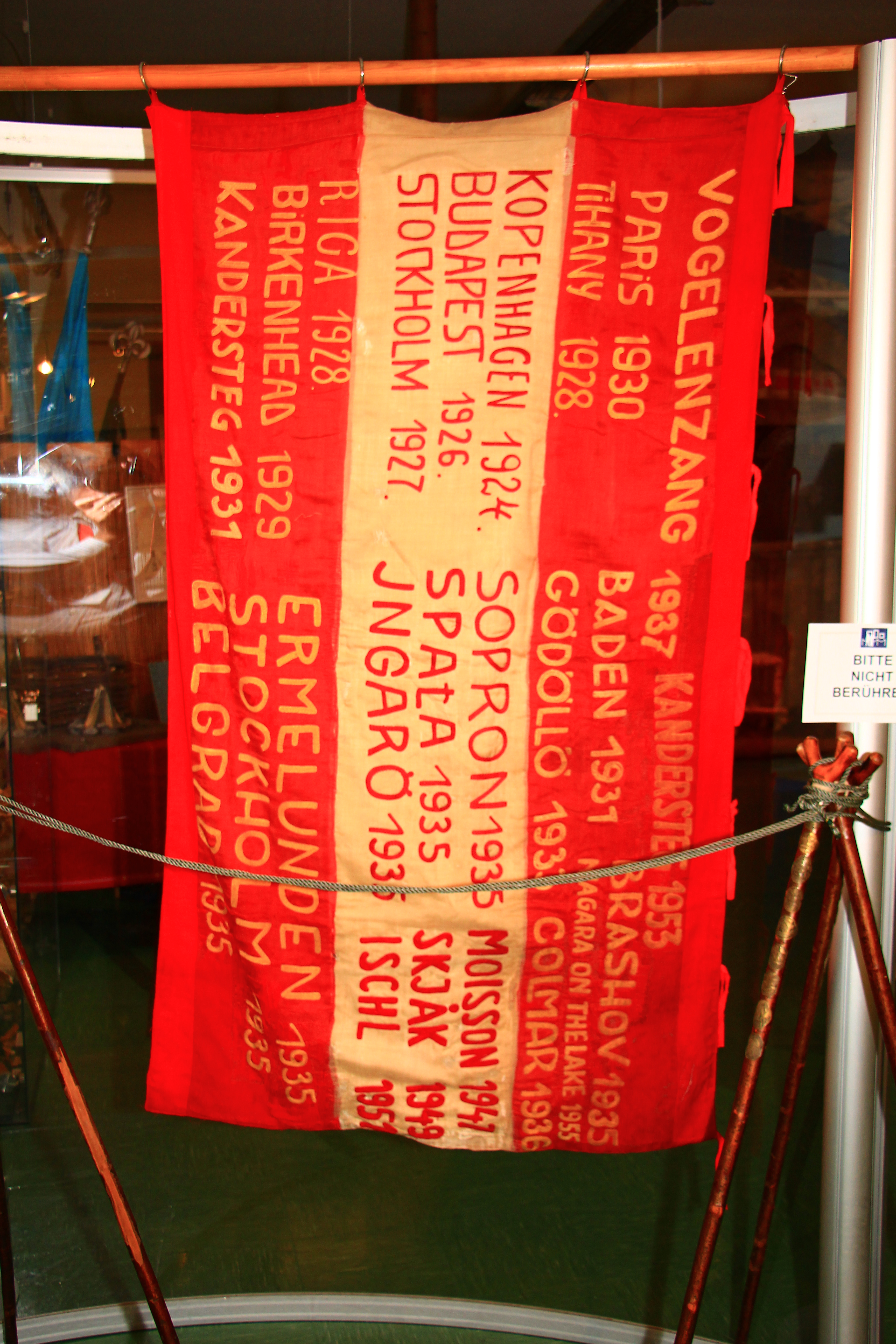 Ausstellungsstücke im Pfadfindermuseum und Institut für Pfadfindergeschichte Dachverband in Wien